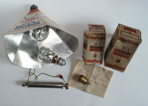 Das Osram Vacublitzprogramm im Oktober 1932.